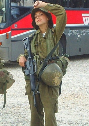 viva_israel4